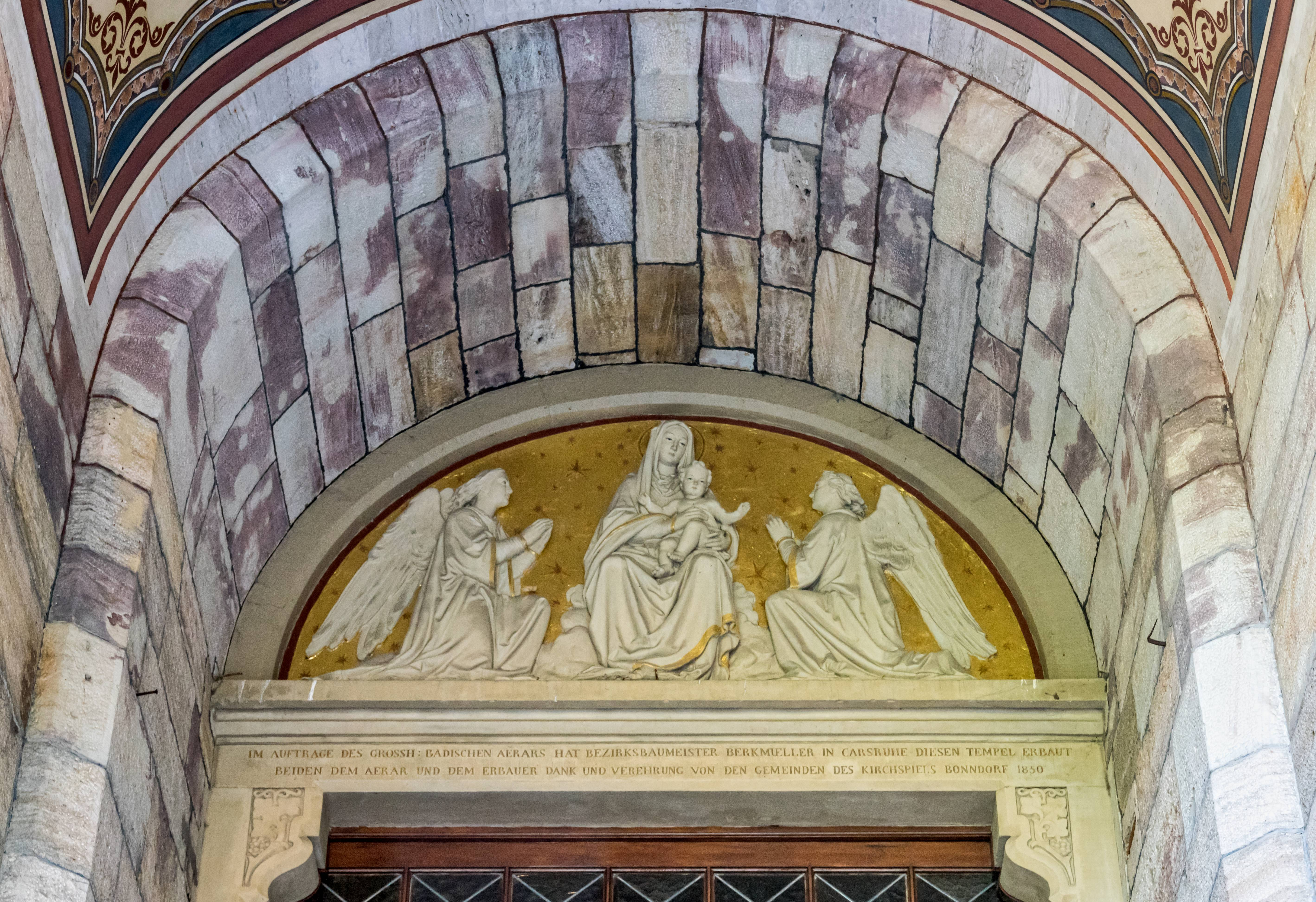 St. Peter und Paul in Bonndorf